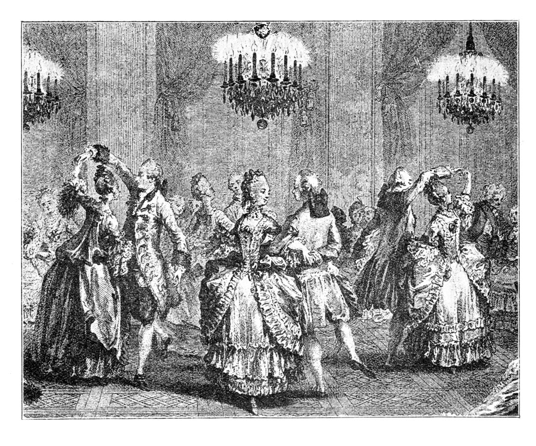 Le bal paré; Ausschnitt aus Stich von Antoine Jean Duclos, 1774